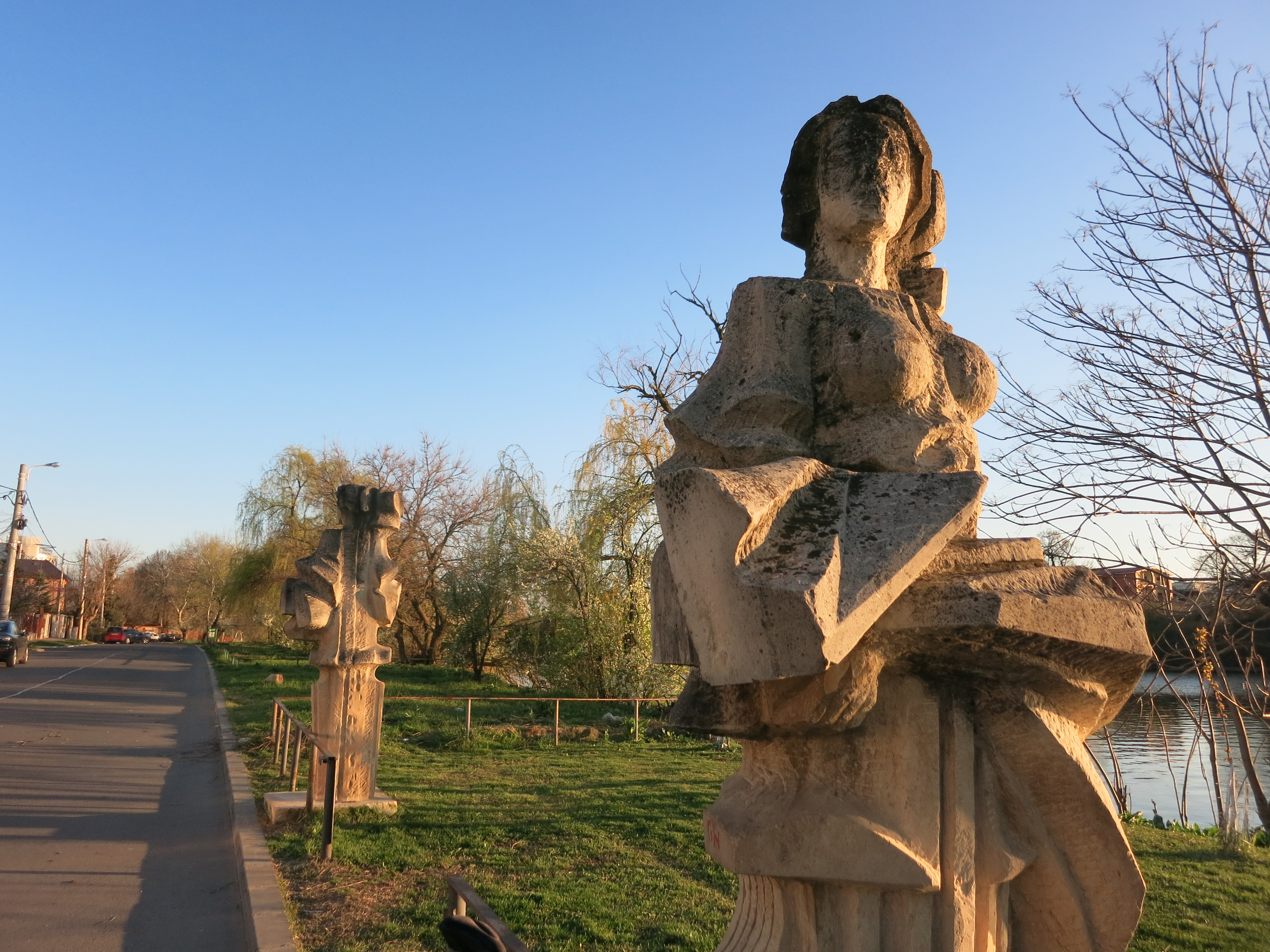 Băneasa municipiul București - Cartierul Băneasa, între Lacul Băneasa și str. Gârlei la NE